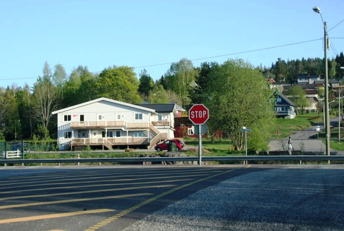 sundbyfoss